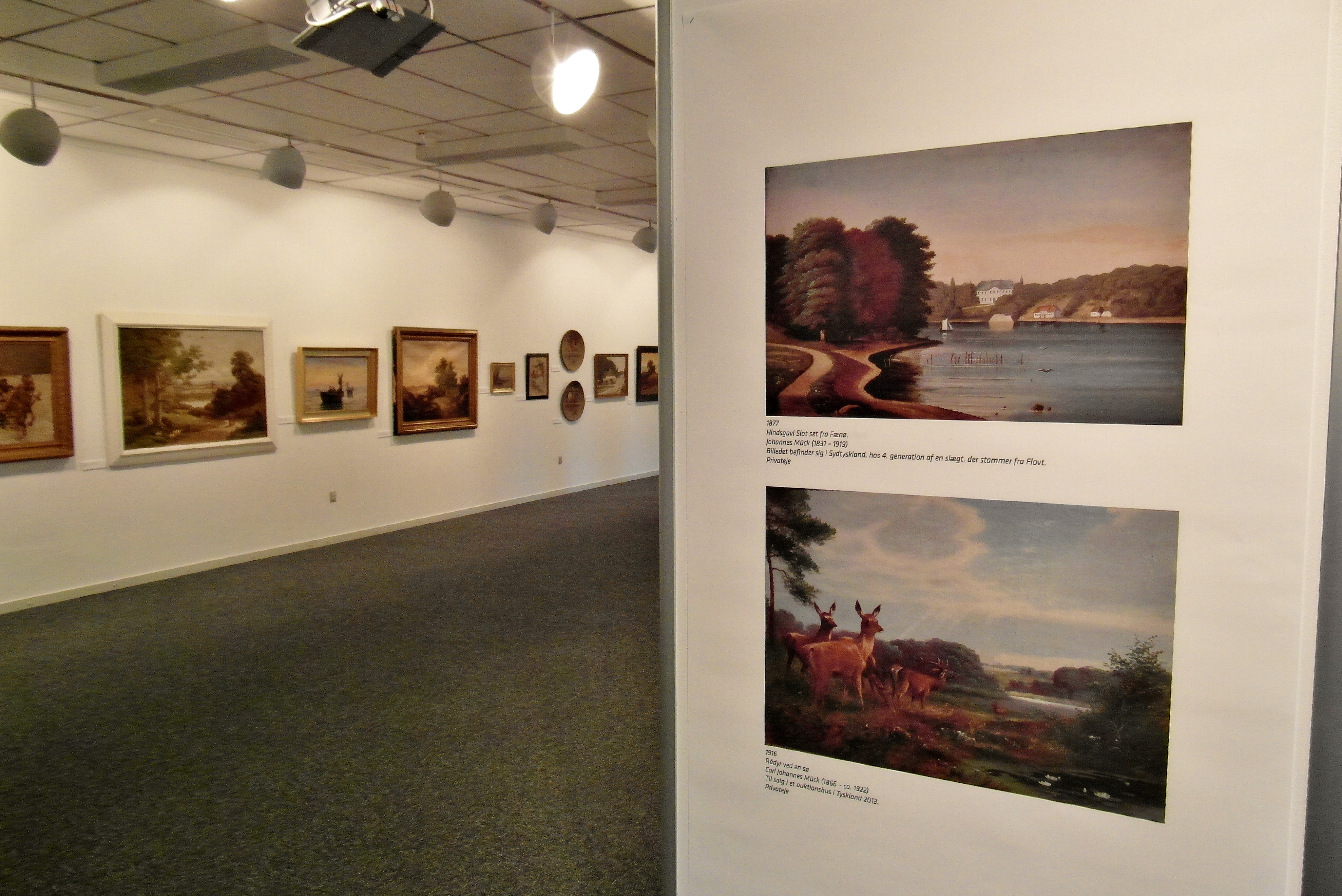 Blick in die Sonderausstellung "MÜCK - en kunstmalerfamilie i Haderslev og Hamborg" im Museum Sonderjylland in Haderslev (Dänemark) mit Bildern von Johannes Mück und seiner Familie